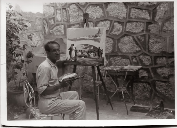 Paco Puertas, 1960